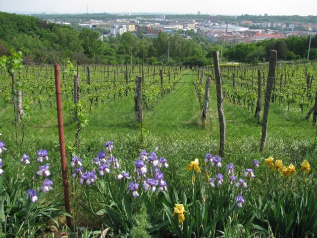 Česky: Vinice Máchalka - pohled z horní části vinice směrem do Vysočan